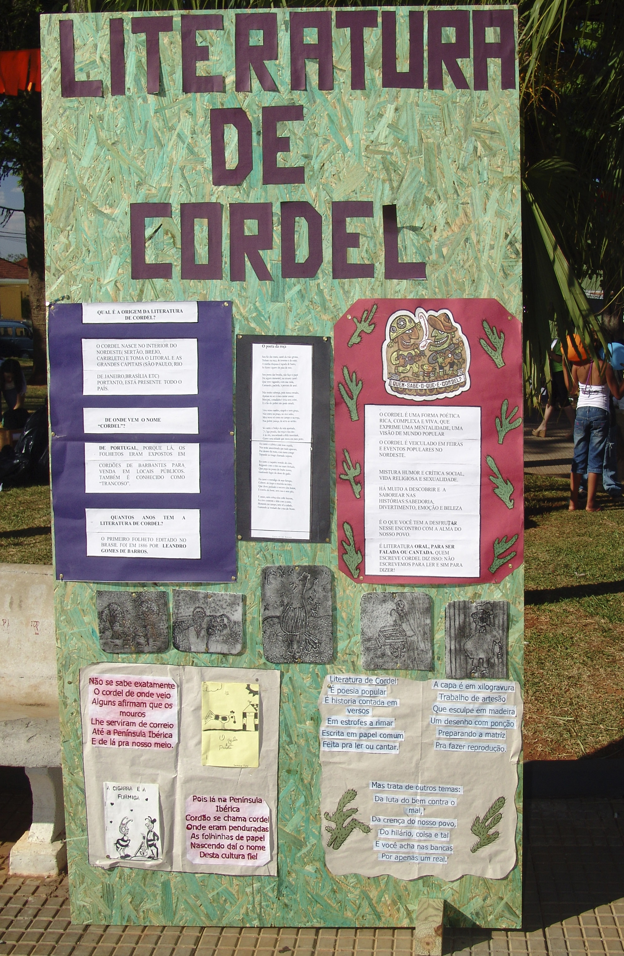 Literatura de cordel, exposição de alunos em praça de Cerqueira César, São Paulo, Brasil